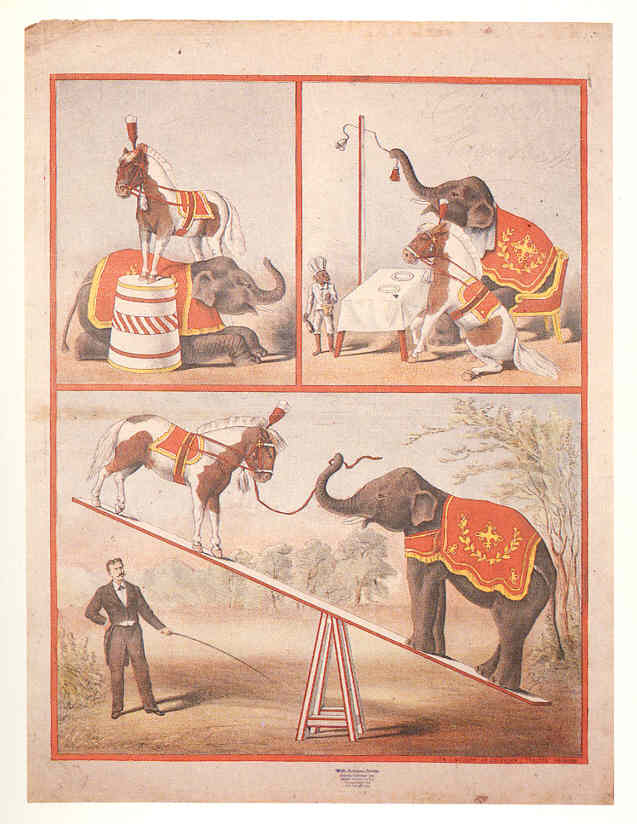 Plakat für einen Circus - Wilhelm Philadelphia